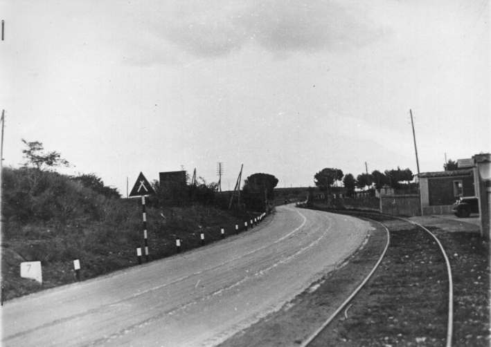 tram Roma-Tivoli